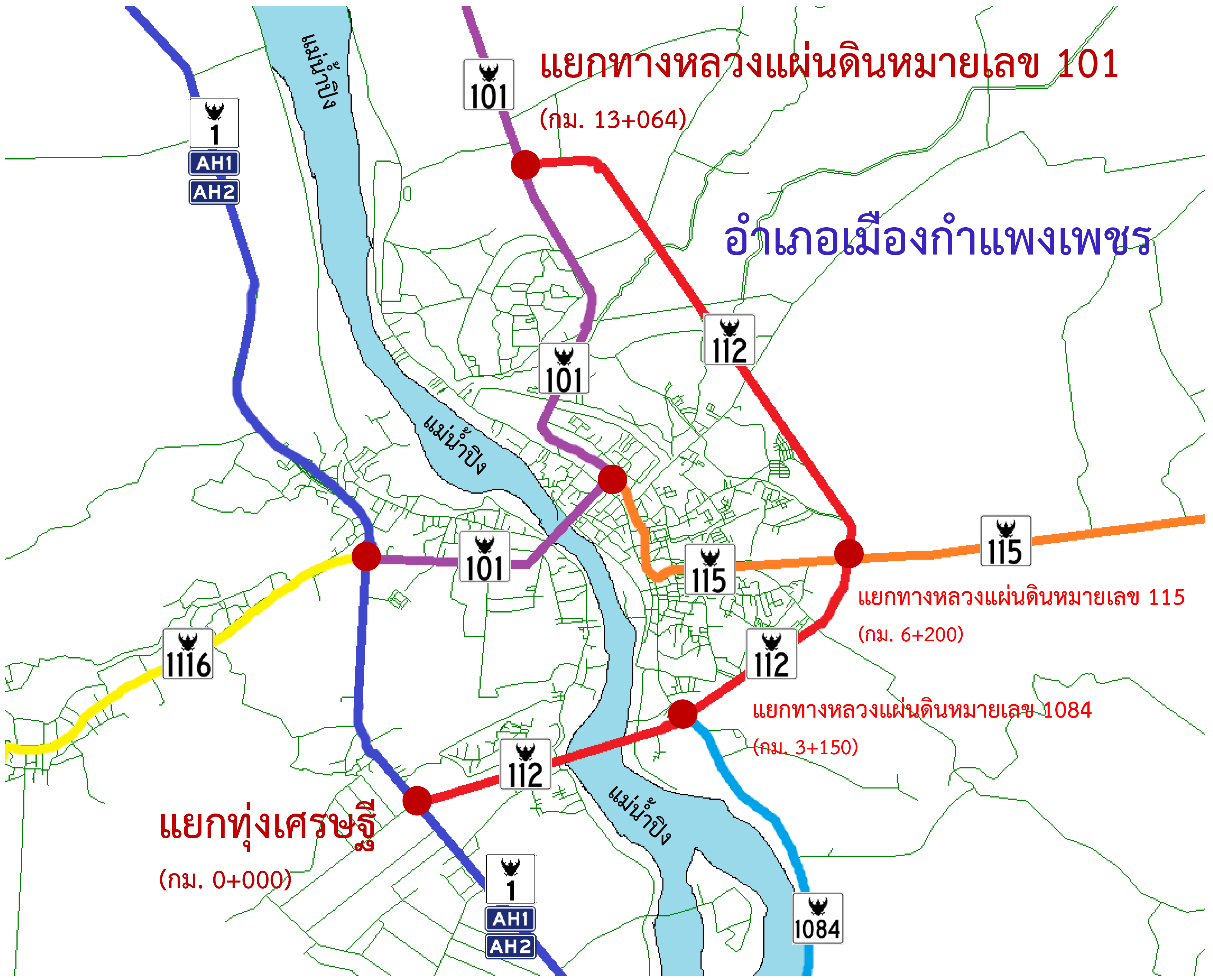 TH HW 112 map